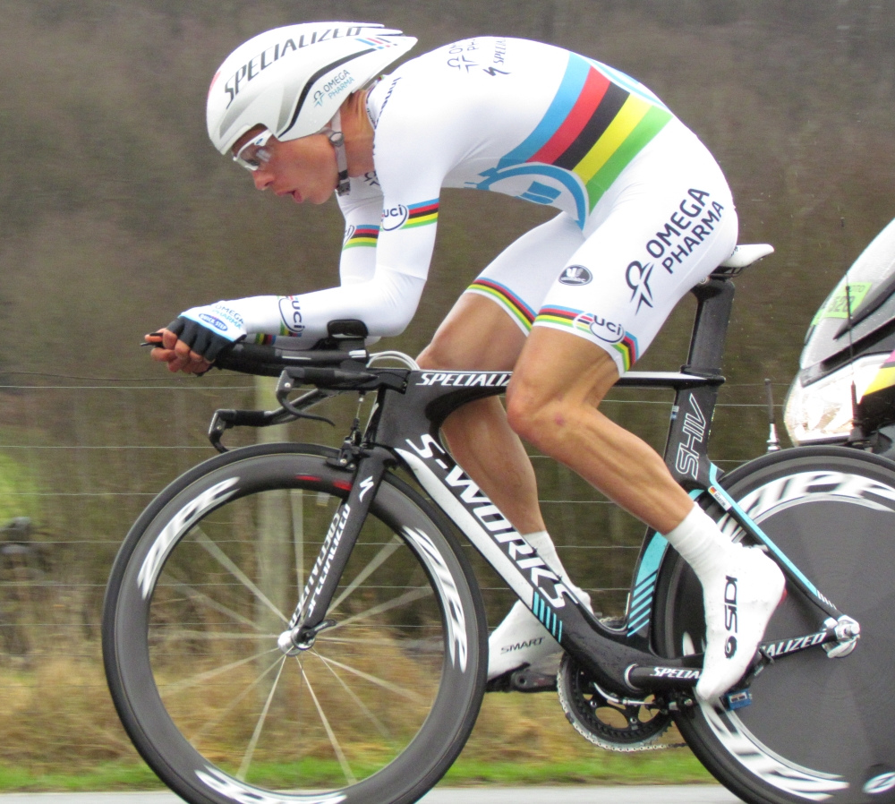 Tony Martin, champion du monde